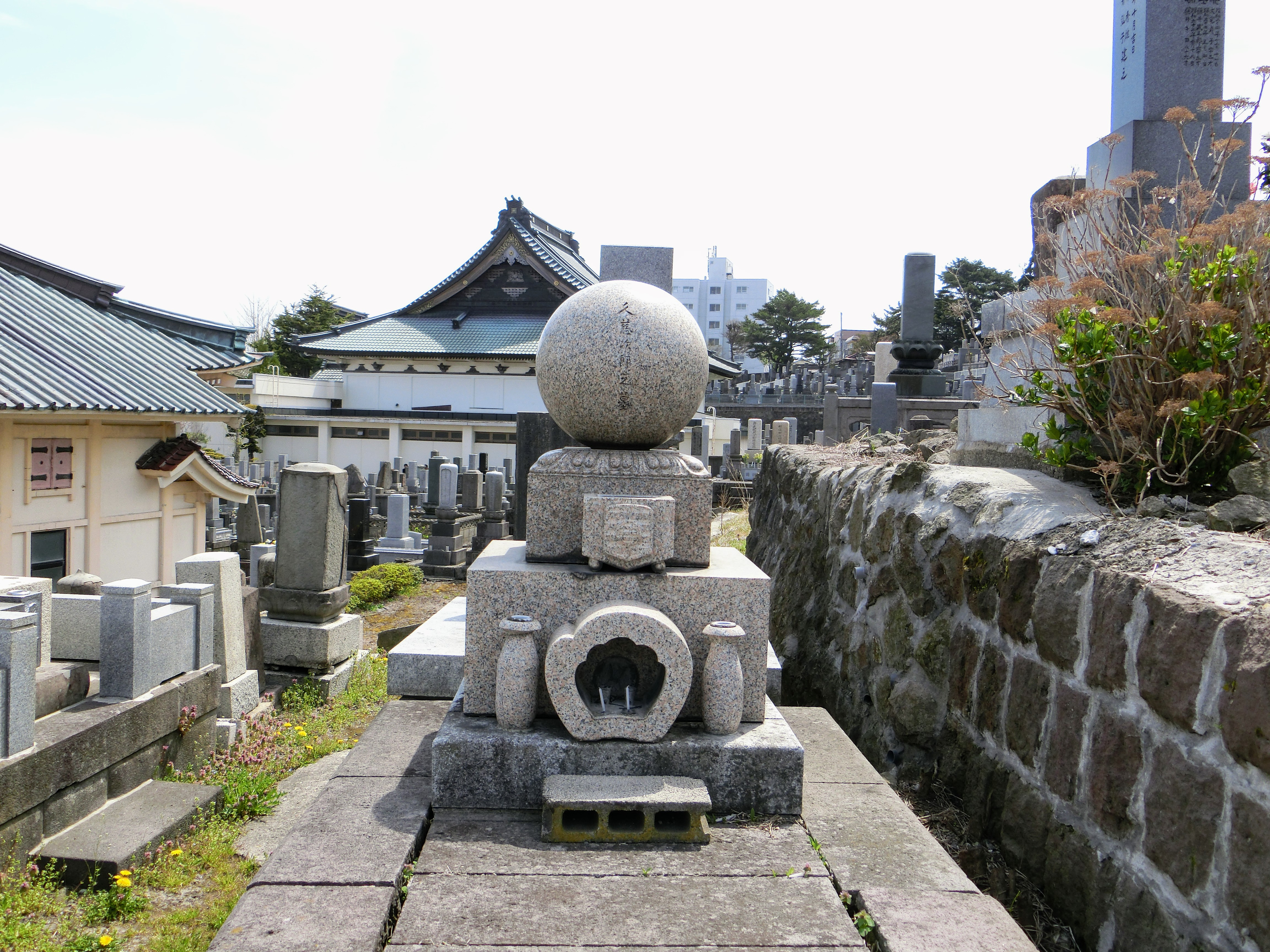 北海道函館市称名寺にある久慈次郎の墓